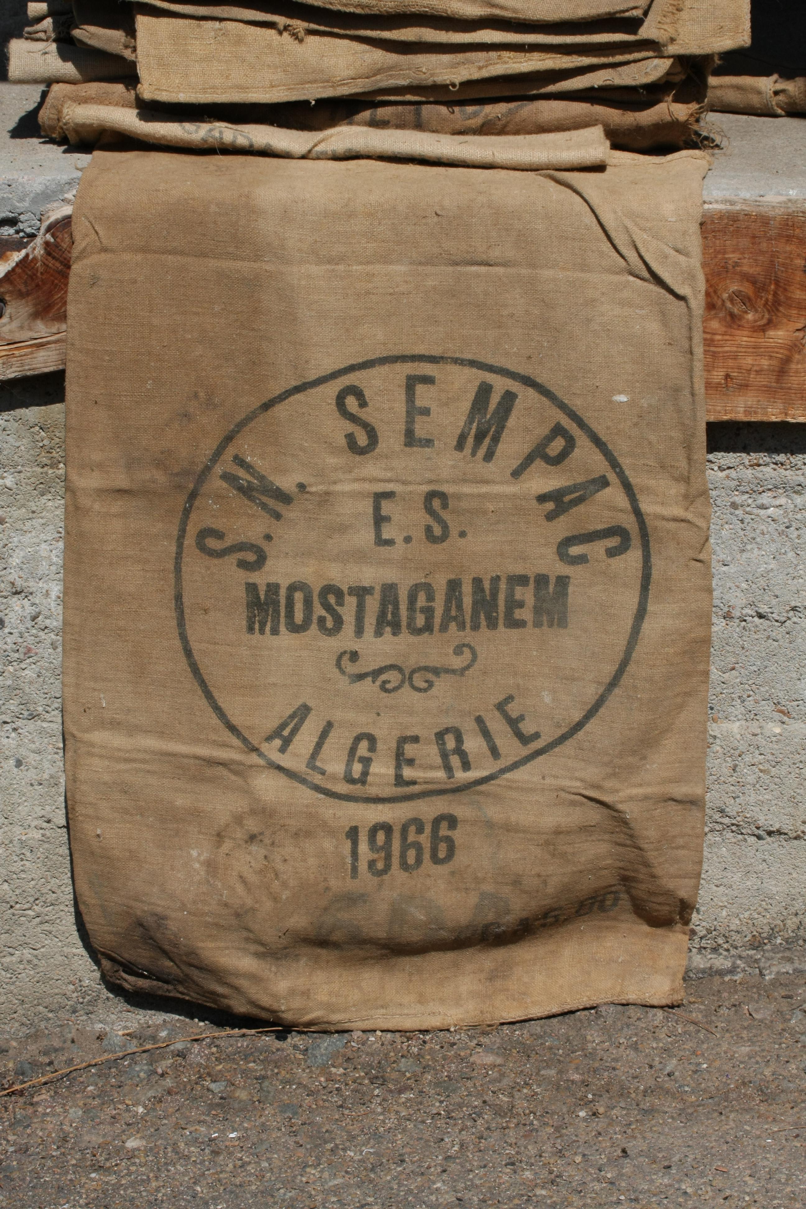 Sac de semoule produit par l'unité de semoulerie de Mostaganem de la SN SEMPAC en 1966